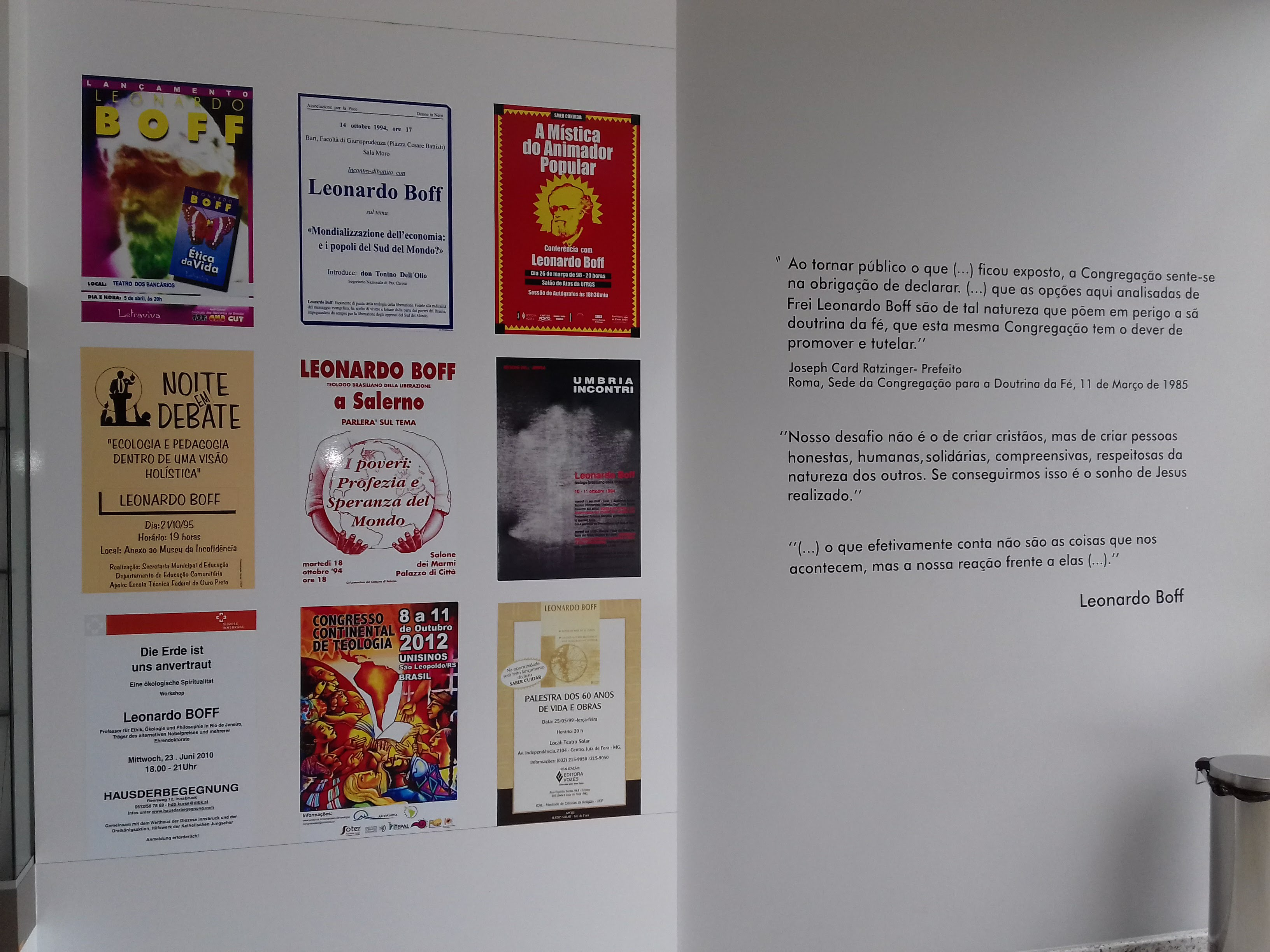 Galeria de Livros - Leonardo Boff, localizado no Centro de Cultura em Concórdia-SC.